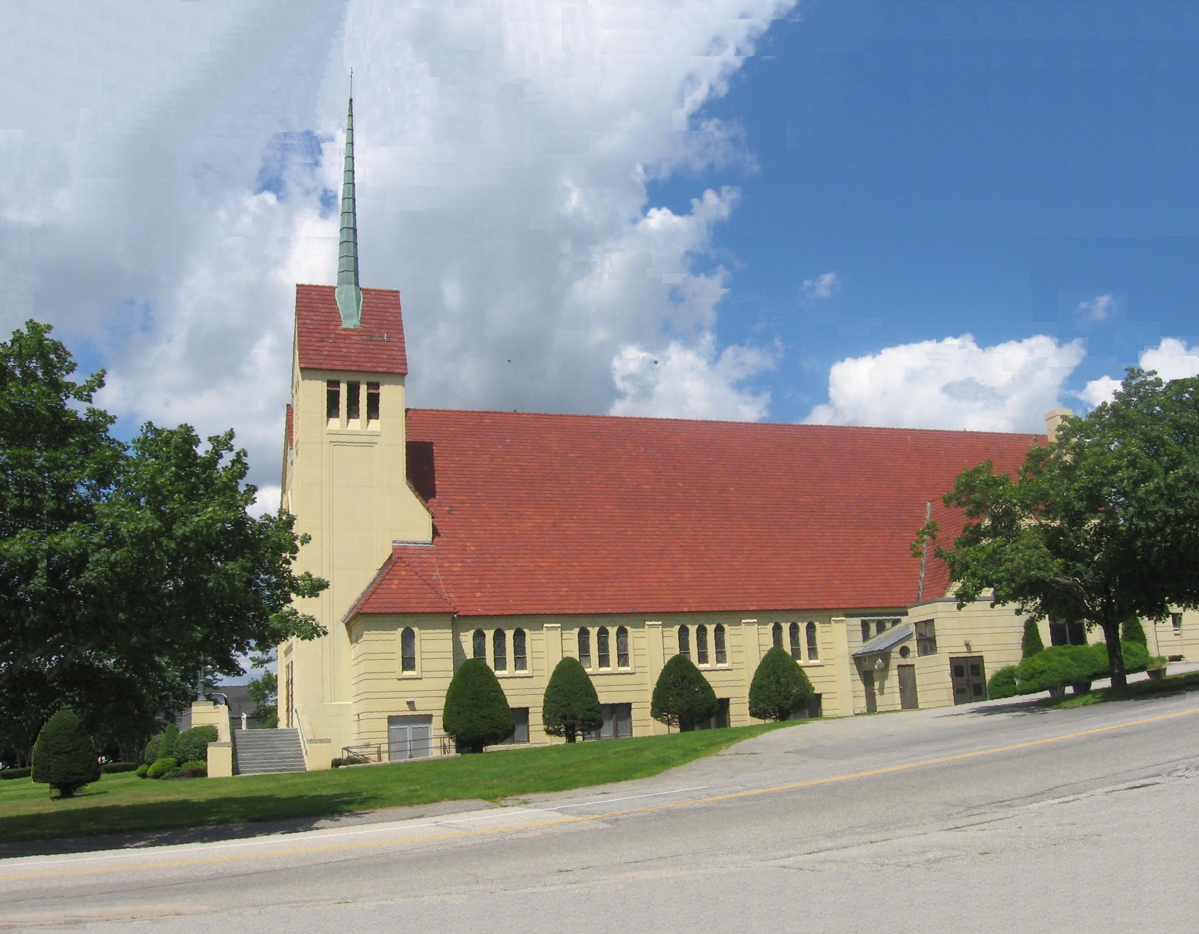 Église à Lewiston, Maine